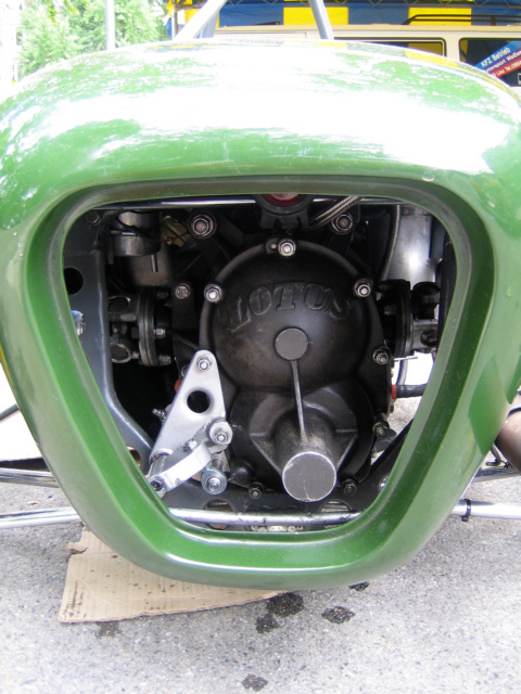 Lotus 18 "Queerbox" details Pau GP 2007